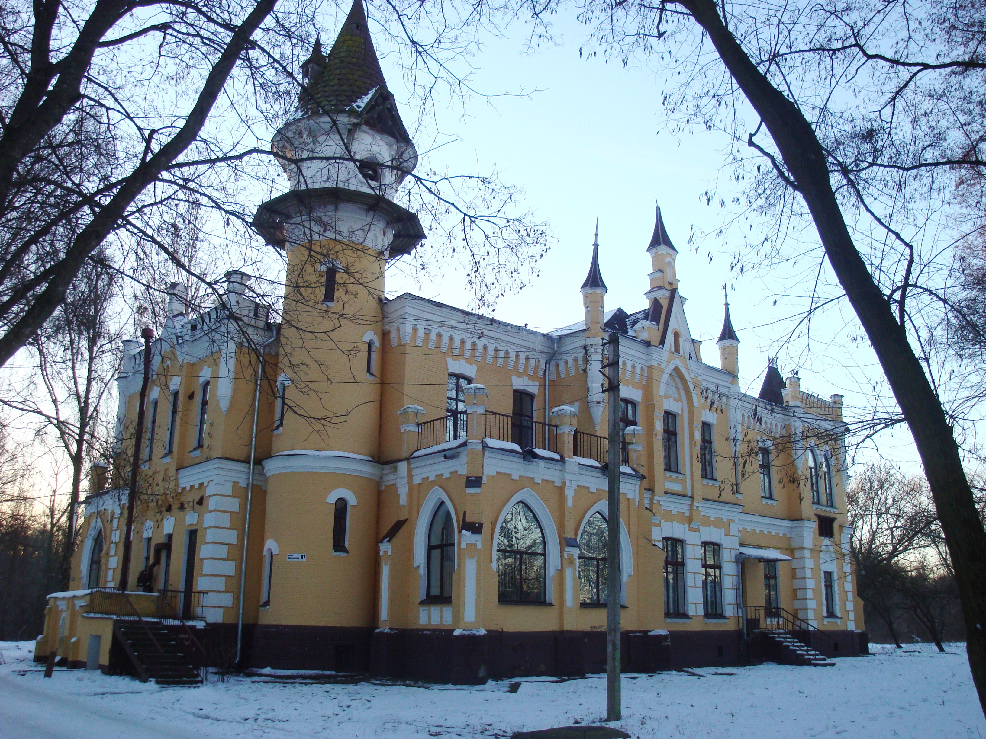 Садибний будинок, Чернігів, вул. Шевченка, 97